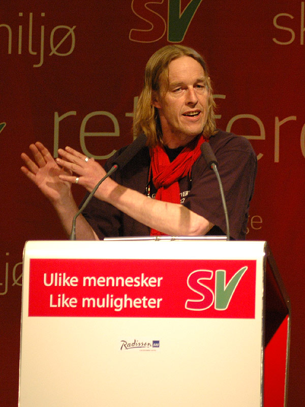 Hallgeir H. Langeland under SVs landsmøte i Kristiansand 2005.